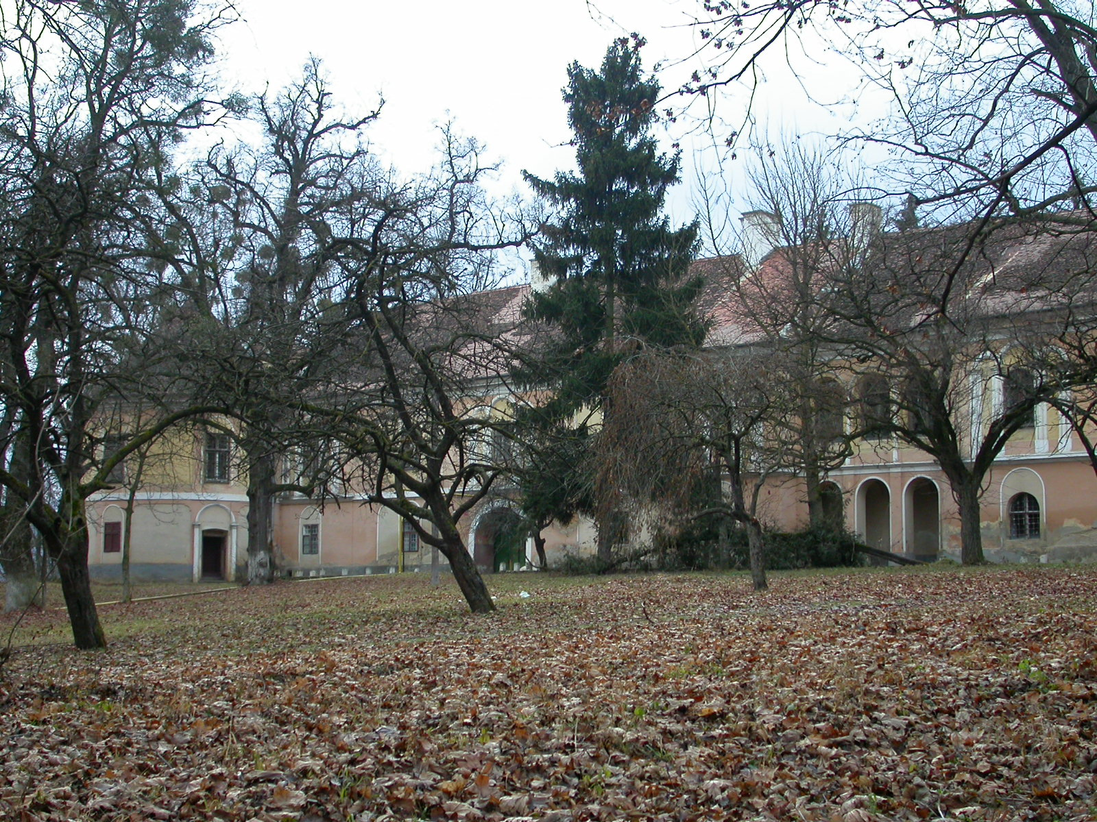 Castelul Wass -Banffy, sec. XV - XIX